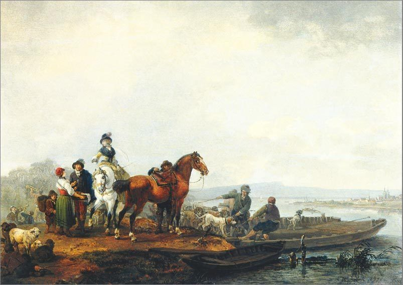 Wilhelm von Kobell (1766–1853): Jagdgesellschaft am Fährplatz, 1791. Öl auf Eichenholz, 33,3 x 40,0 cm. WV 155. Museum Georg Schäfer, Schweinfurt, Inv. Nr. 3231.